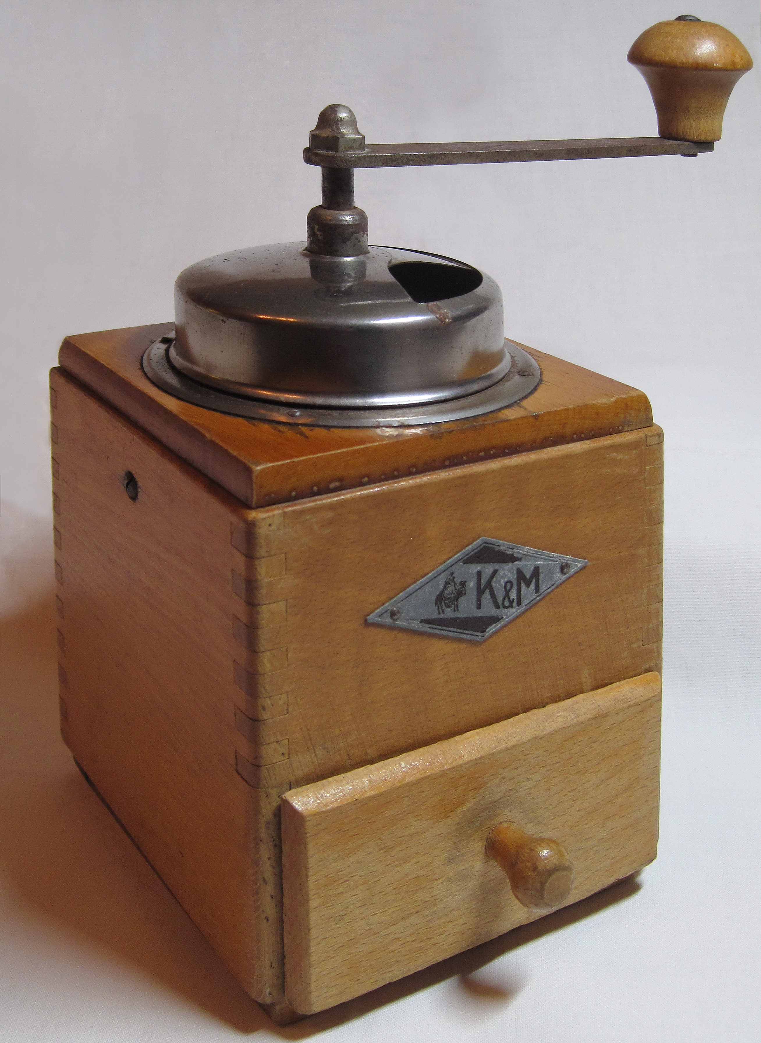 Kaffeemühle KYM Nr. 9311 aus den 1950er-Jahren mit Schiebeblechtrichter, Schubladenwandung aus Stahlblech und geschmiedetem gefrästen Stahlmahlwerk mit Stellschraube für Feinmahlung, innen unter dem Mahlkegel. Hersteller war das ehemalige Unternehmen Kissing & Möllmann (KYM) in Iserlohn, Obere Mühle.